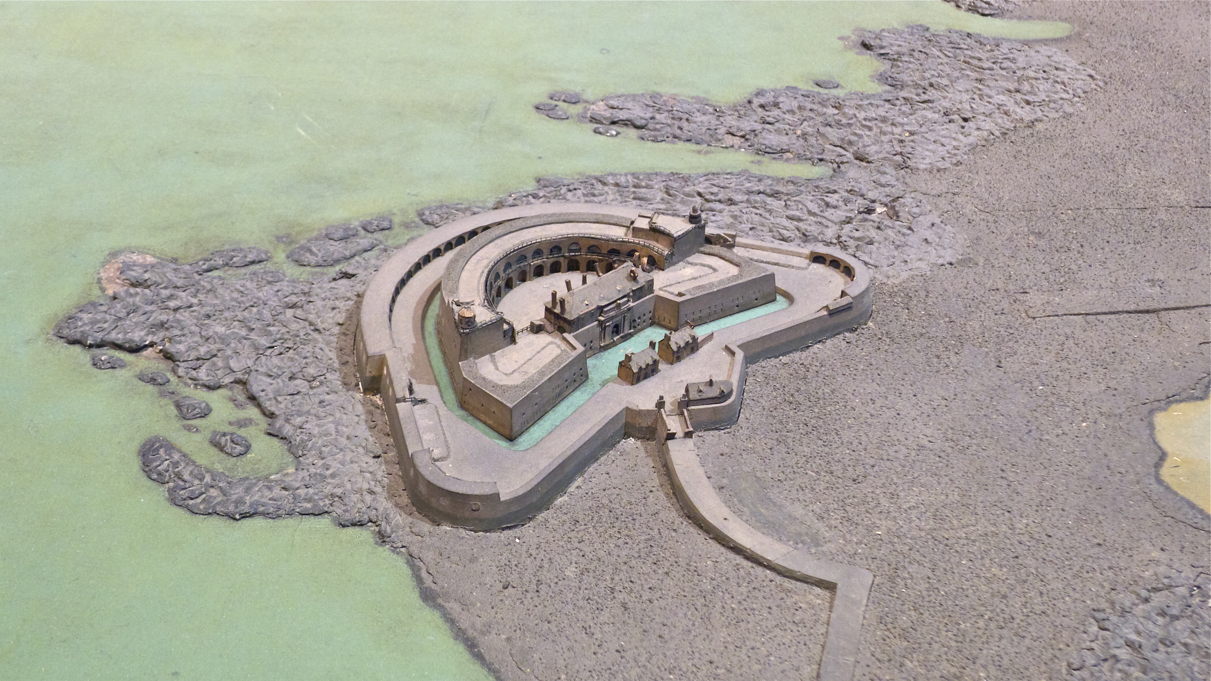 Plan-relief du fort de l'île Pelée à Cherbourg dans son état de 1872. Plan-relief construit de 1813 à 1819 et actualisé de 1863 à 1872. Échelle 1/600e